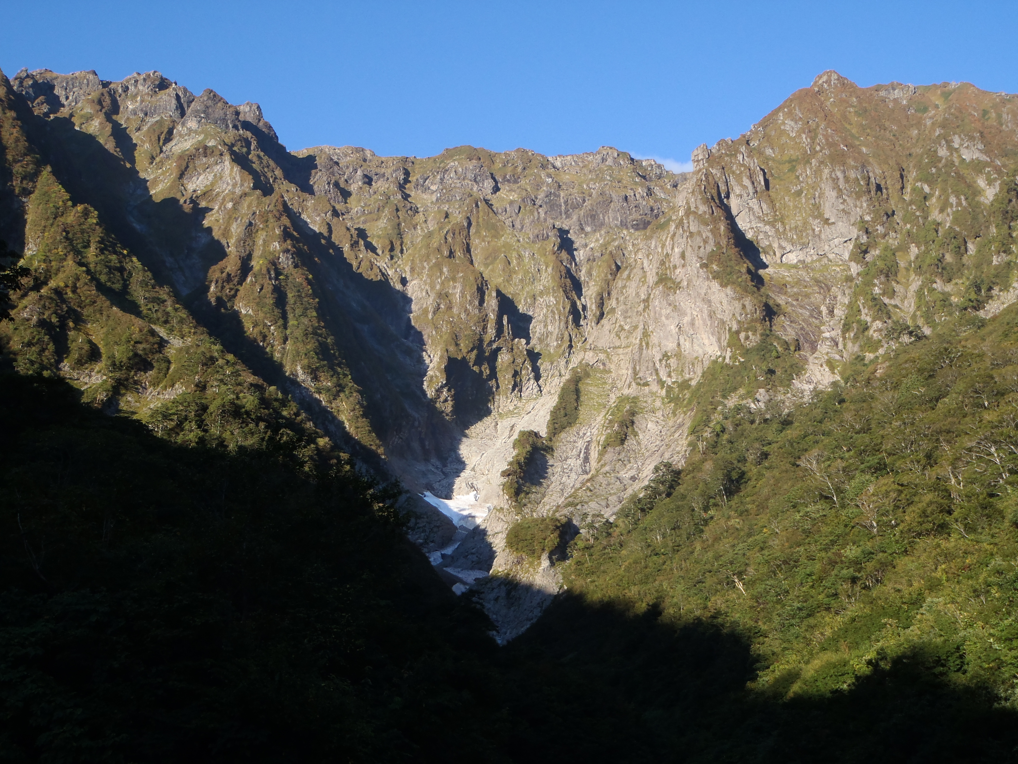 谷川岳一ノ倉沢 2012年10月8日の朝に撮影